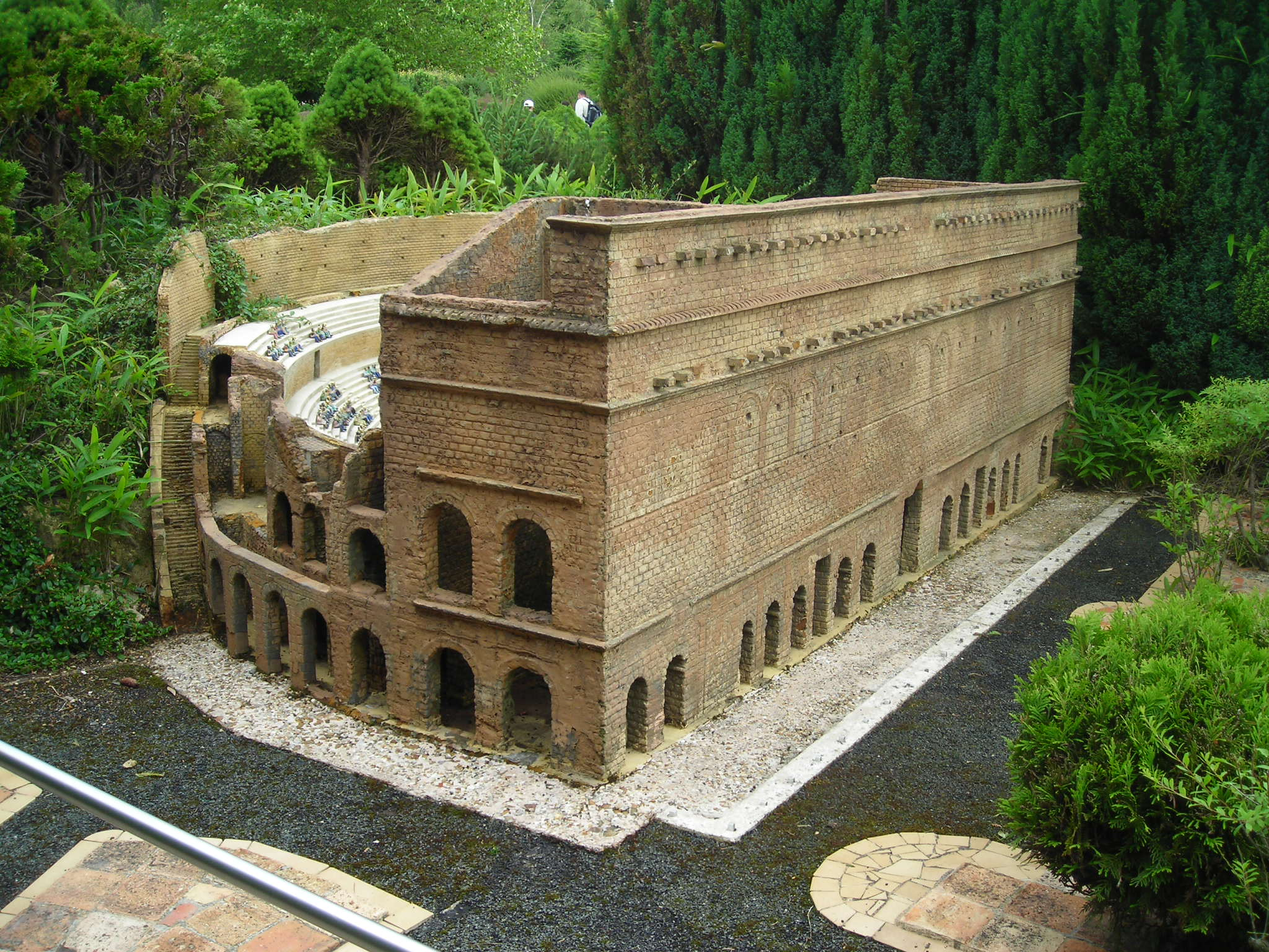 Maquette du théatre d'Orange à France Miniature (Élancourt)